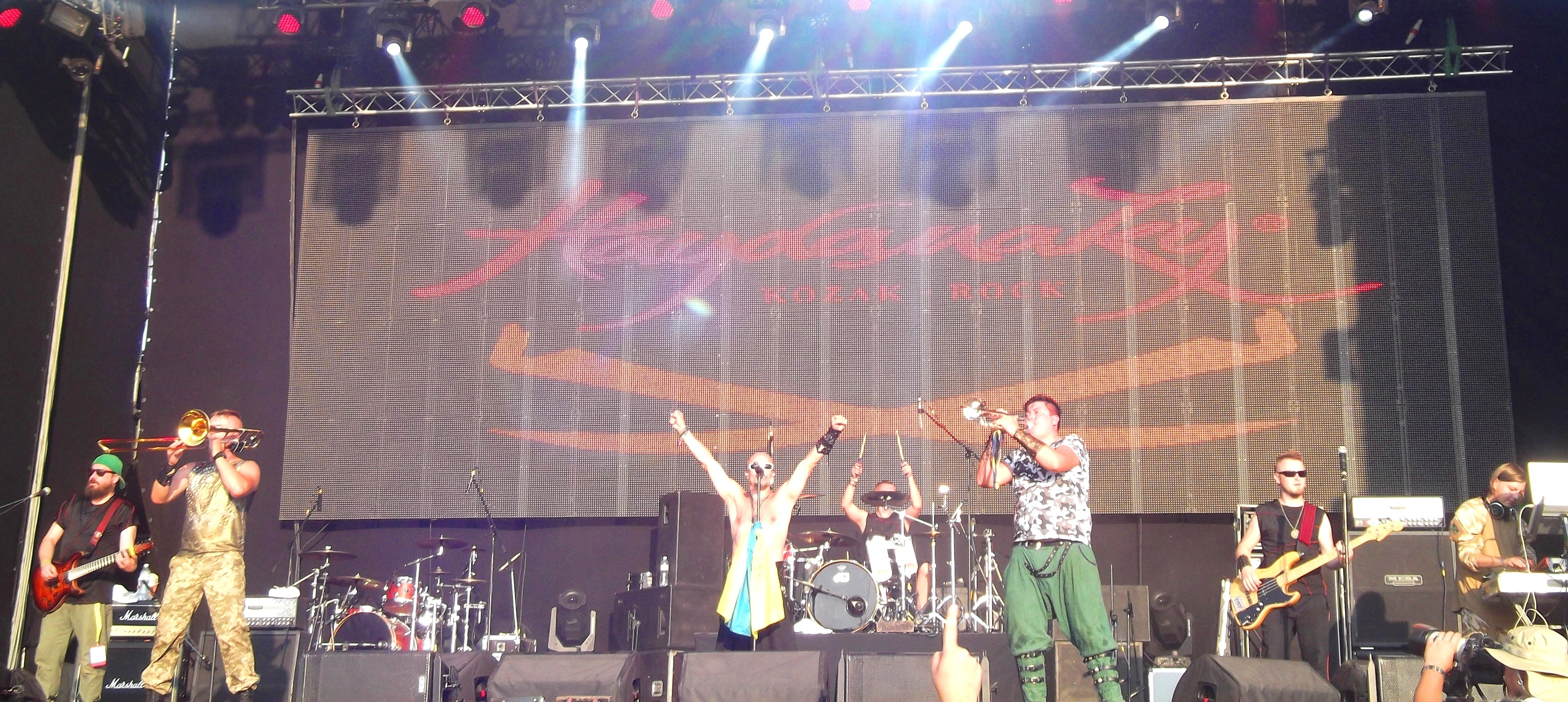 Гурт Гайдамаки виступає на головній сцені фестивалю Захід 2015, Чарівна долина, село Родатичі, Городоцький район Львівської області, 14.08.2015 р.